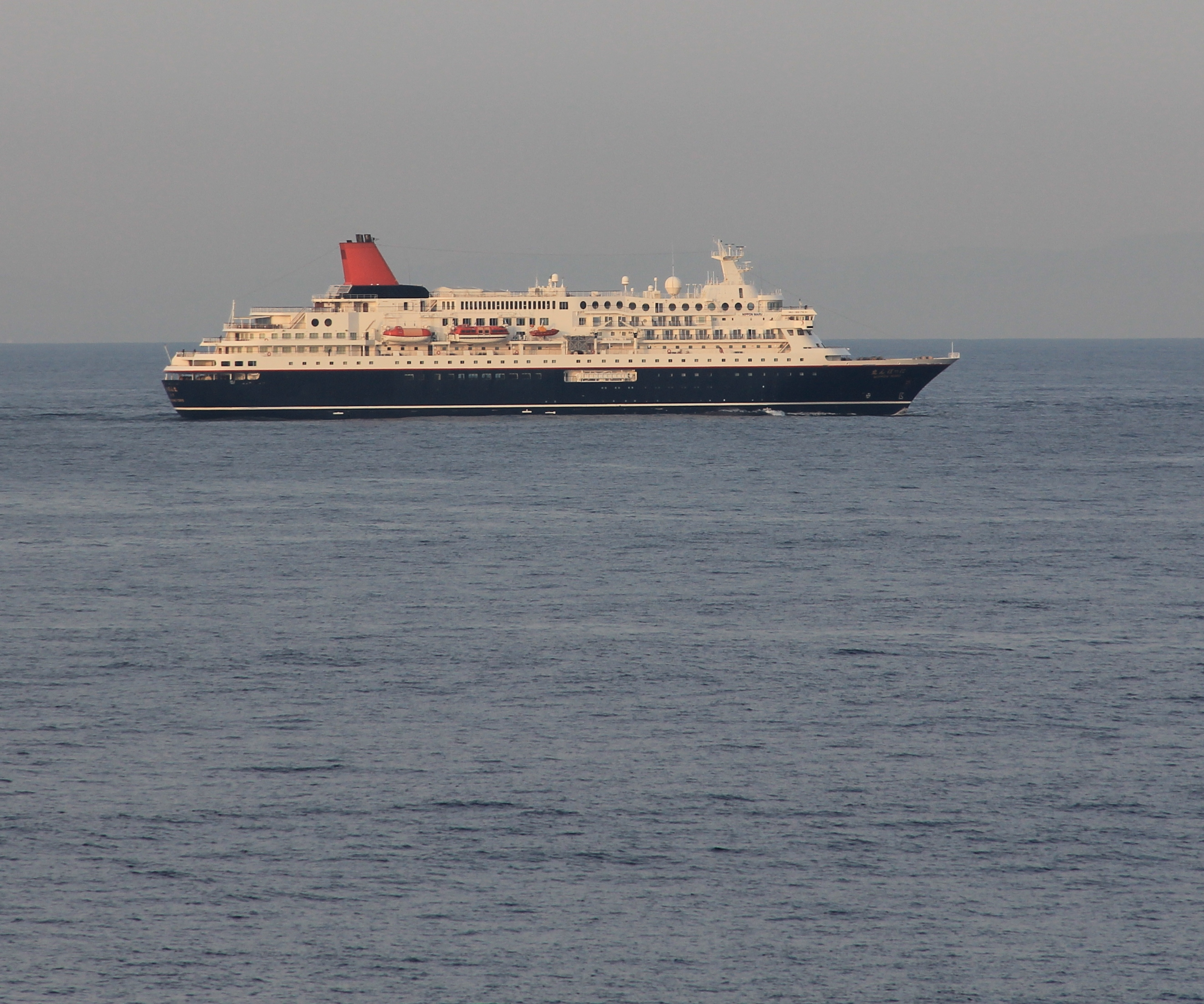 三陸沖 太平洋フェリーきそ船上から